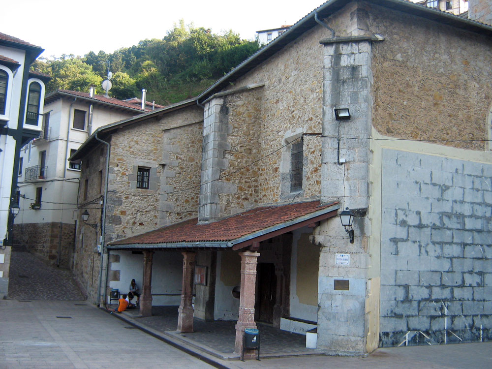 Iglesia de San Nicolás de Bari, en Elantxobe (Vizcaya)